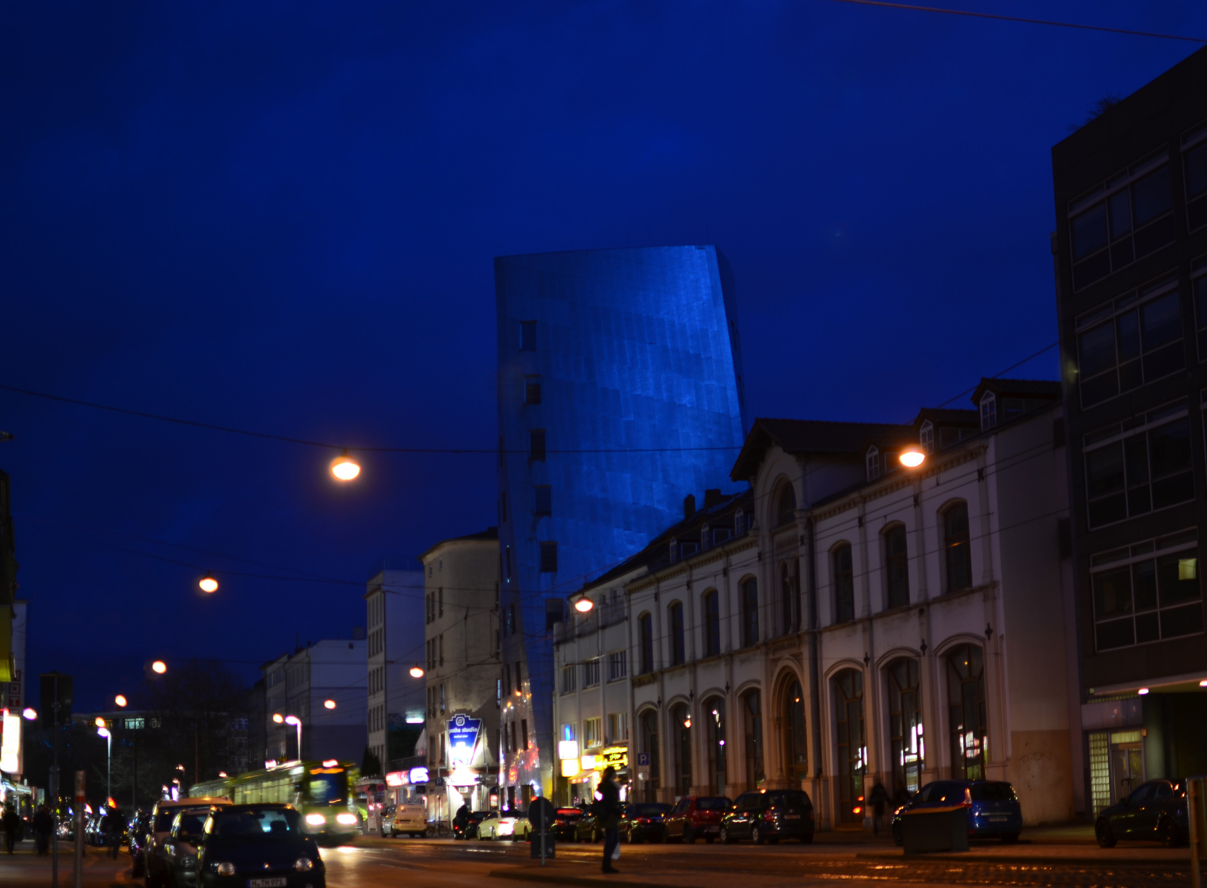 Gehry-Tower Blaue Stunde